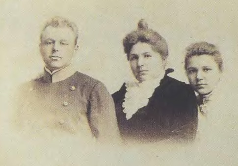 Дети и жена Михаила Григорьевича Шевелёва - Владимир, Александра Дмитриевна, Маргарита